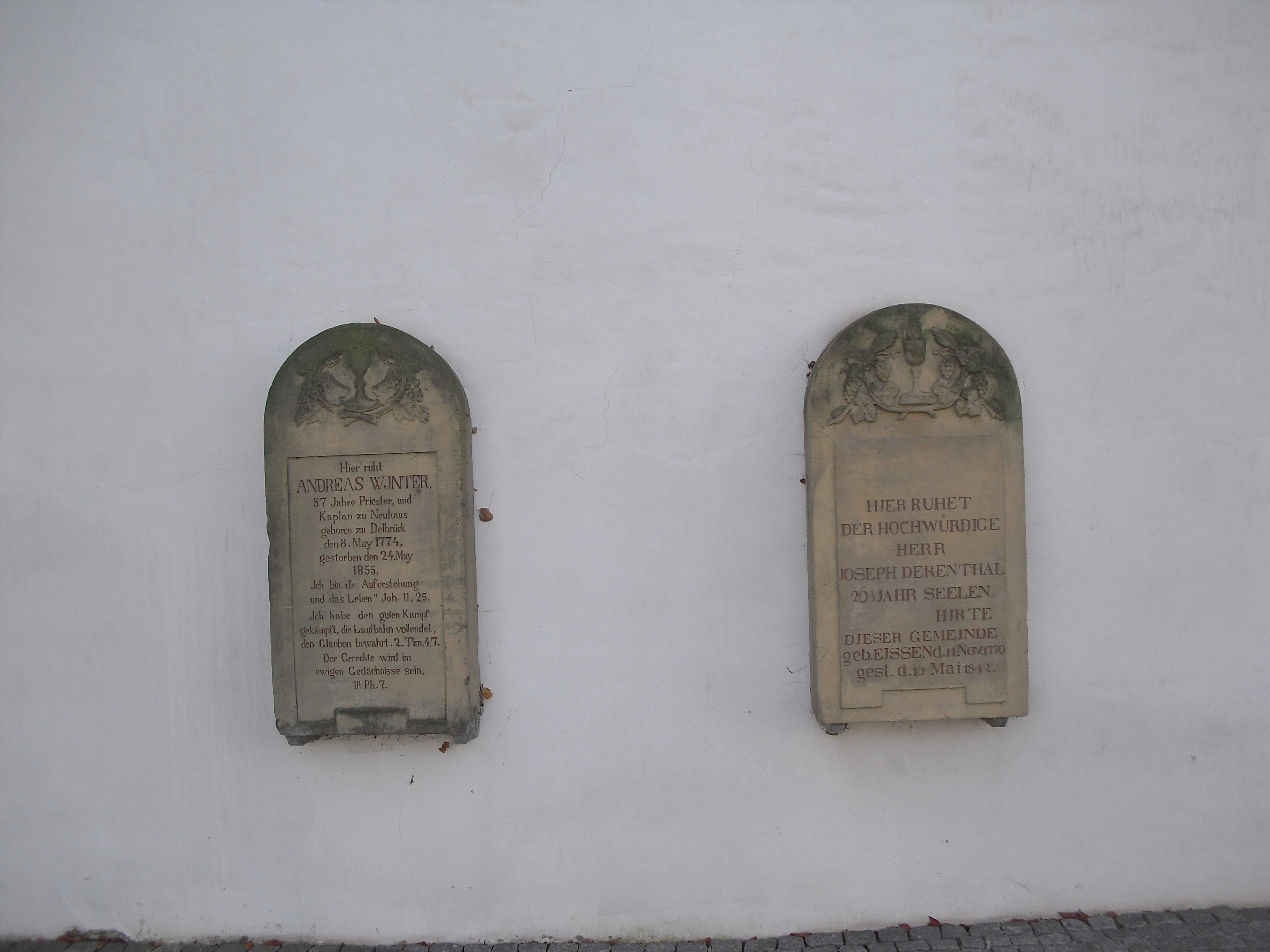 Pristergräber an der Kirche in Paderborn-Schloß Neuhaus